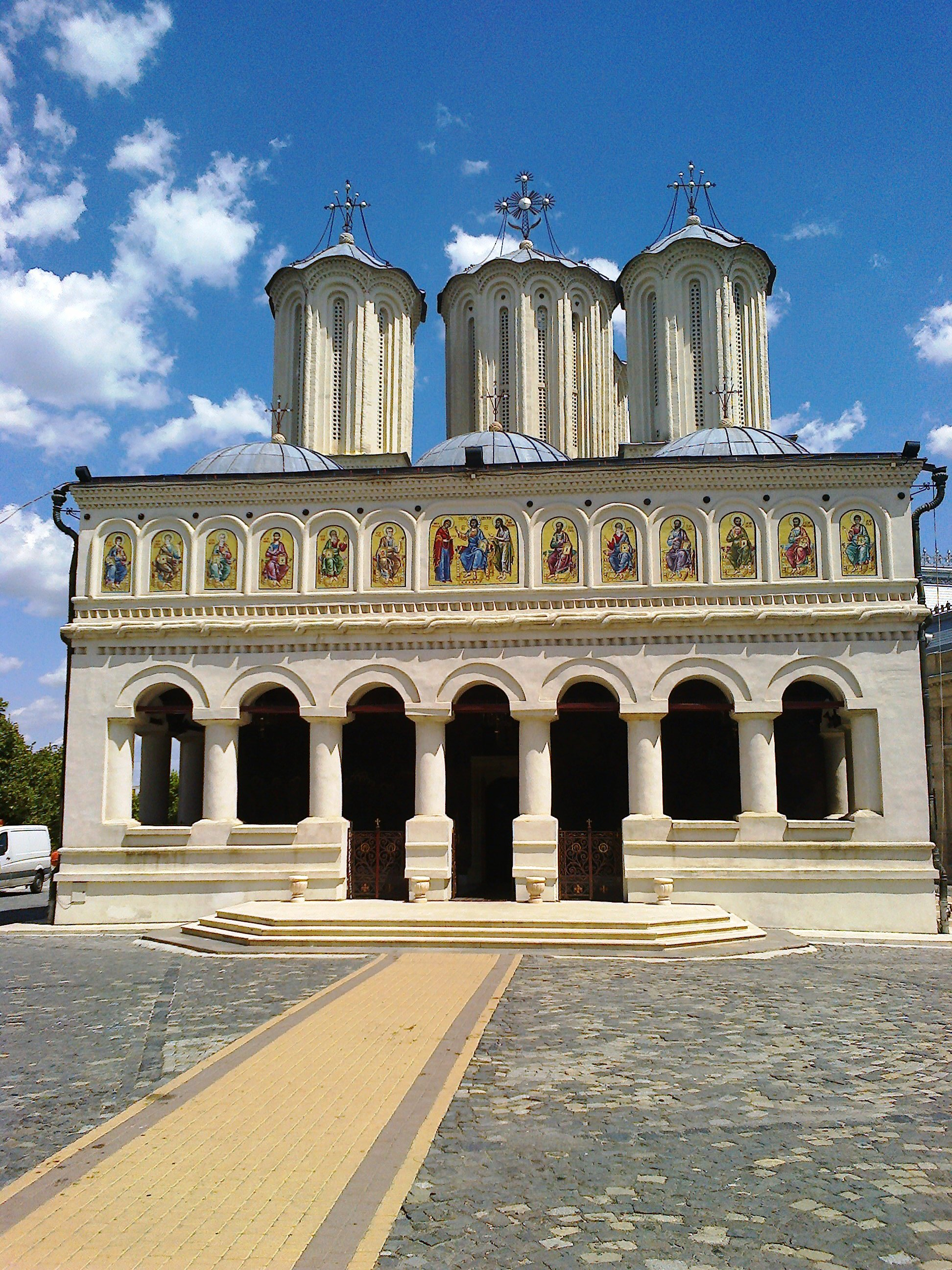 Bucuresti, Romania (CATEDRALA PATRIARHALA) (fatada) (B-II-m-A-18571.01). Catedrala Patriarhală este o biserică din Bucureşti, situată pe Dealul Patriarhiei, ctitorită de voievodul Constantin Şerban şi soţia acestuia, Bălaşa, între anii 1654-1658. Biserica, purtând hramul Sfinţii Împăraţi Constantin şi Elena, a fost sfinţită de Mihnea al III-lea în anul 1658, iar la scurt timp a fost transformată în Mitropolie. După primul război mondial Mitropolia a fost transformată în Patriarhie (în 1925). 01